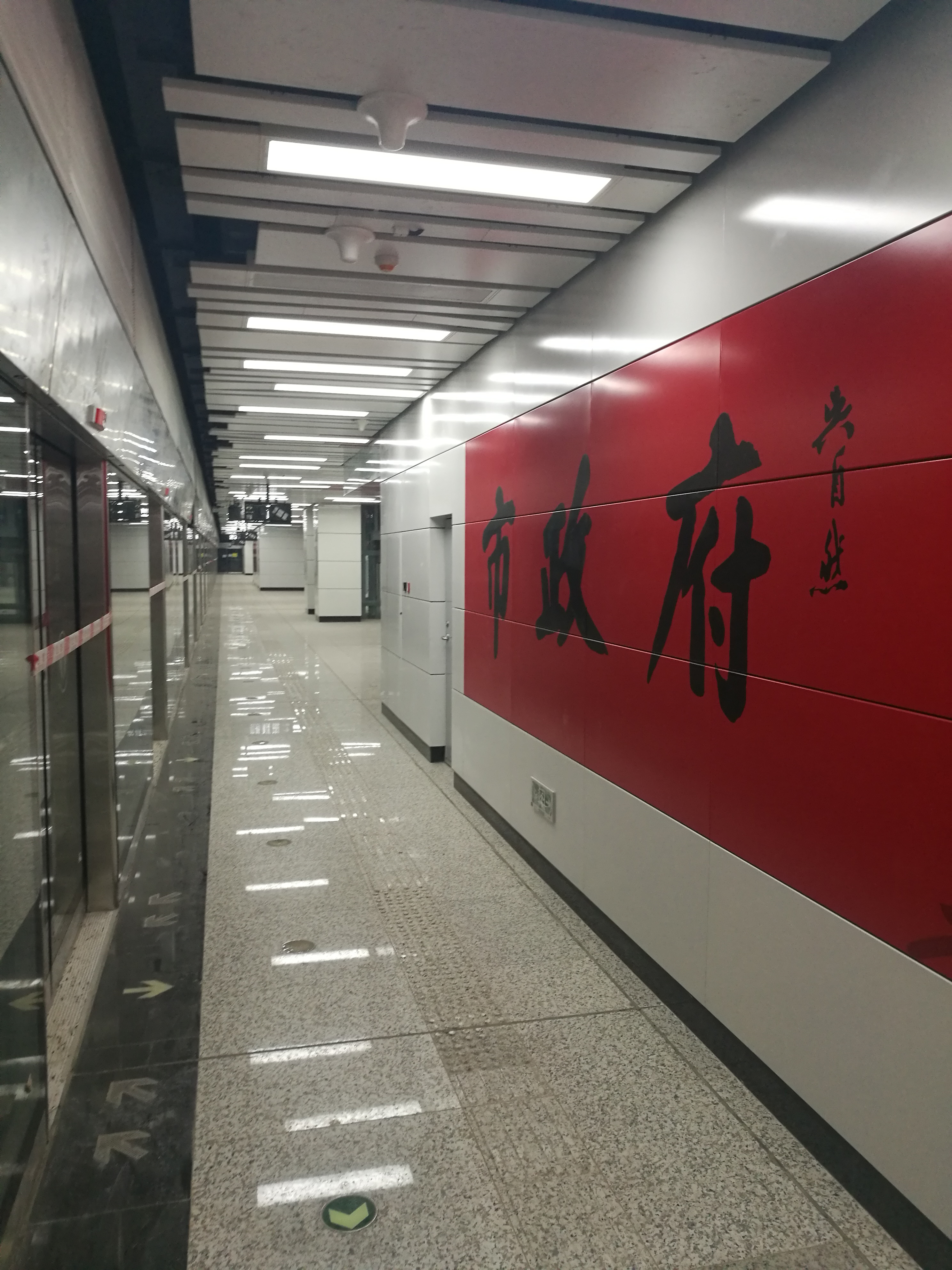 南环城路站大字壁